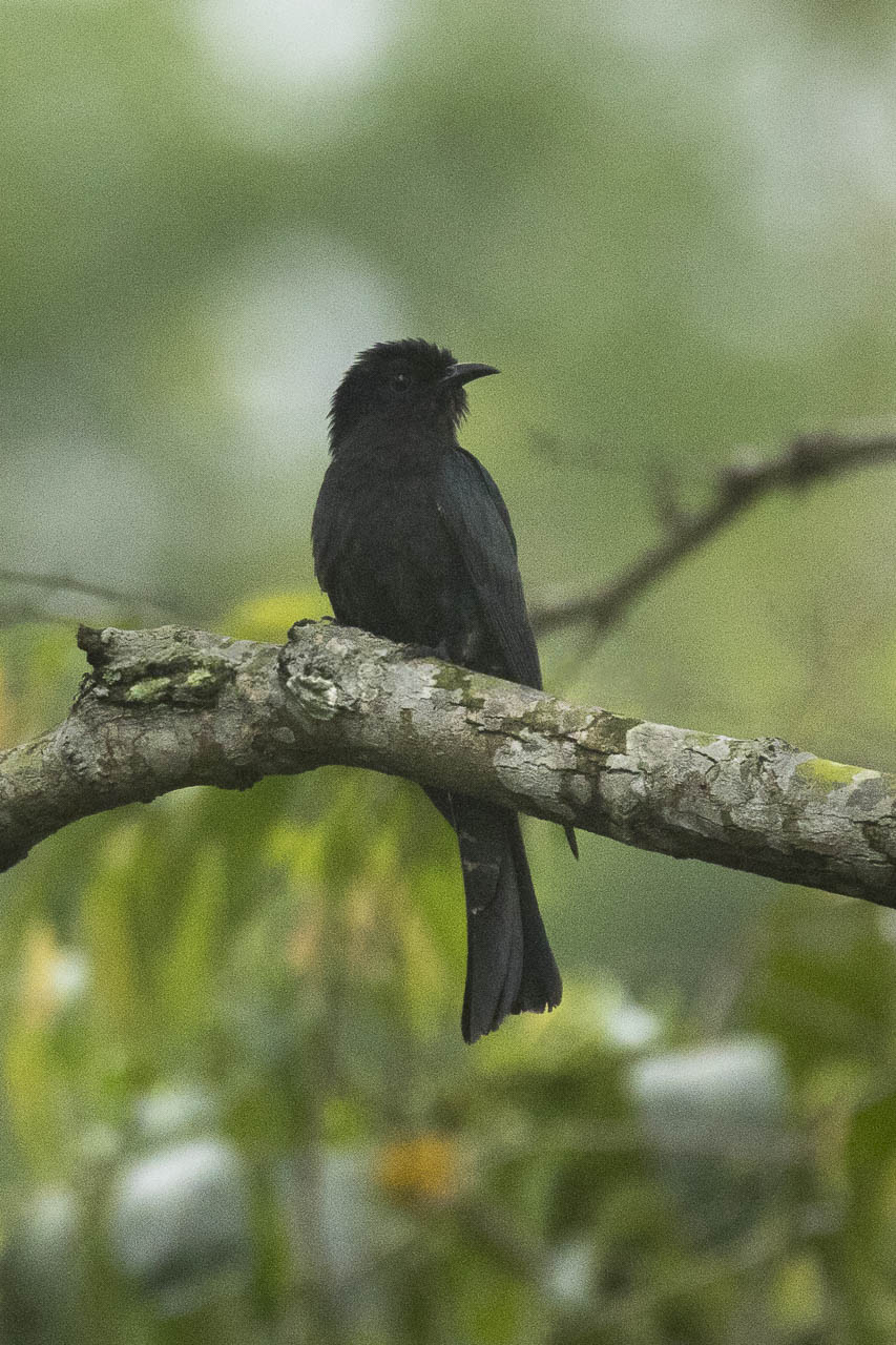 Asian Drongo-Cuckoo - Kaziranga NP - Assam -- India_